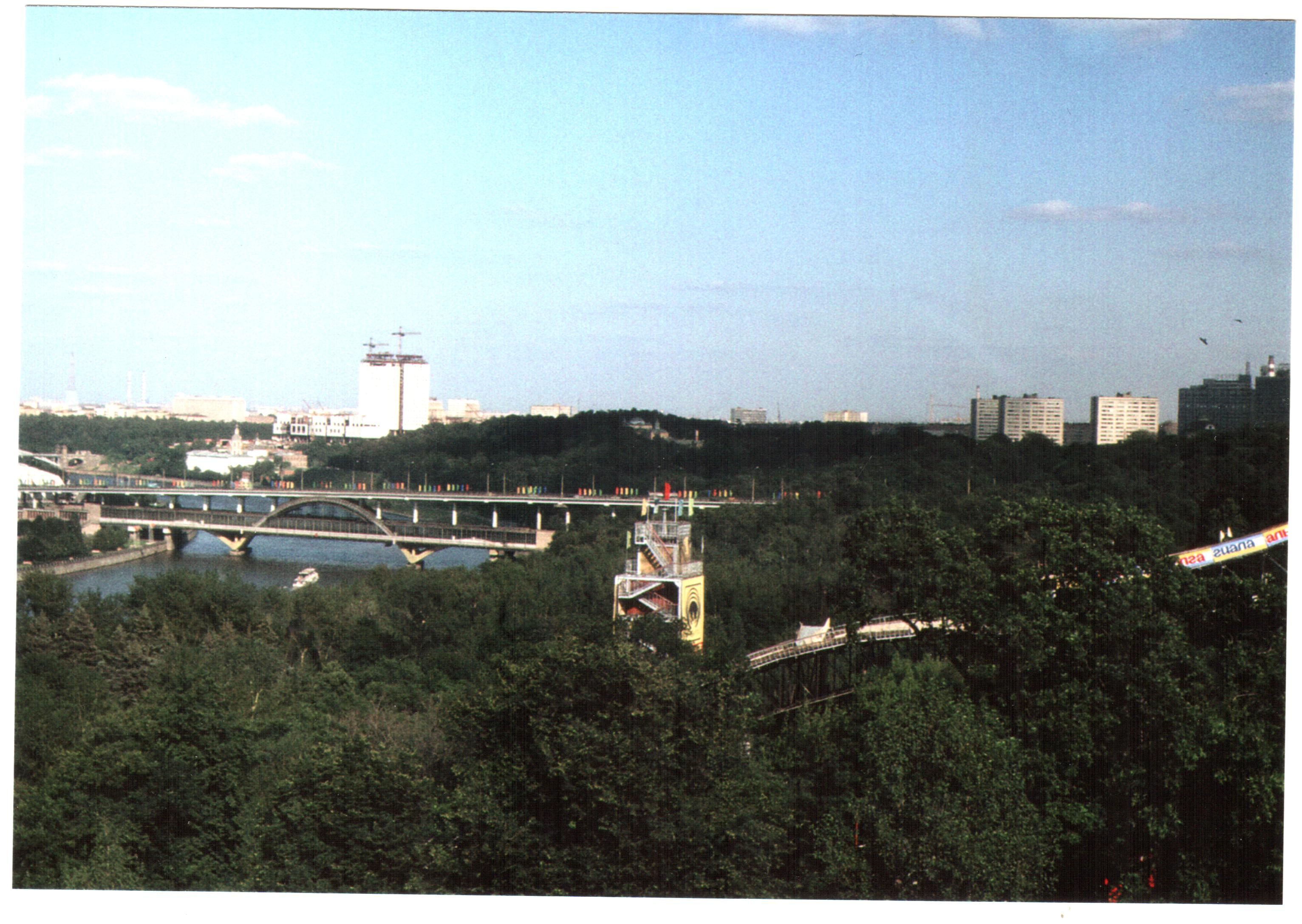 Moscow Olympic Games, 1980. Live in Moscow, in the Summer, 1980. I travelled with a Hungarian group of fans, from Budapest, Hungary. Published under Creative Commons in the Metapolisz DVD line.